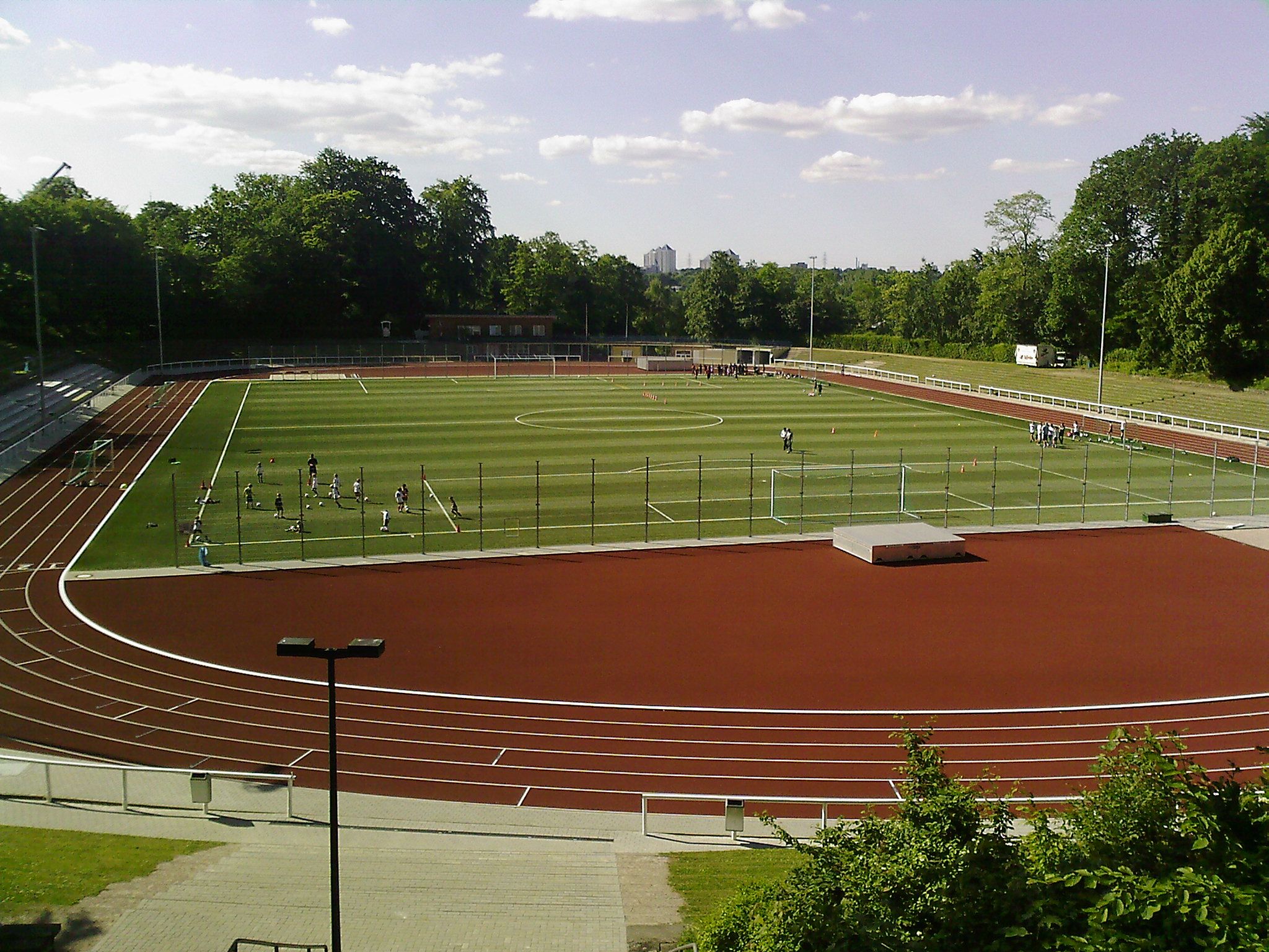 Das Billtalstadion in Hamburg-Bergedorf nach der Sanierung 2009/2010.